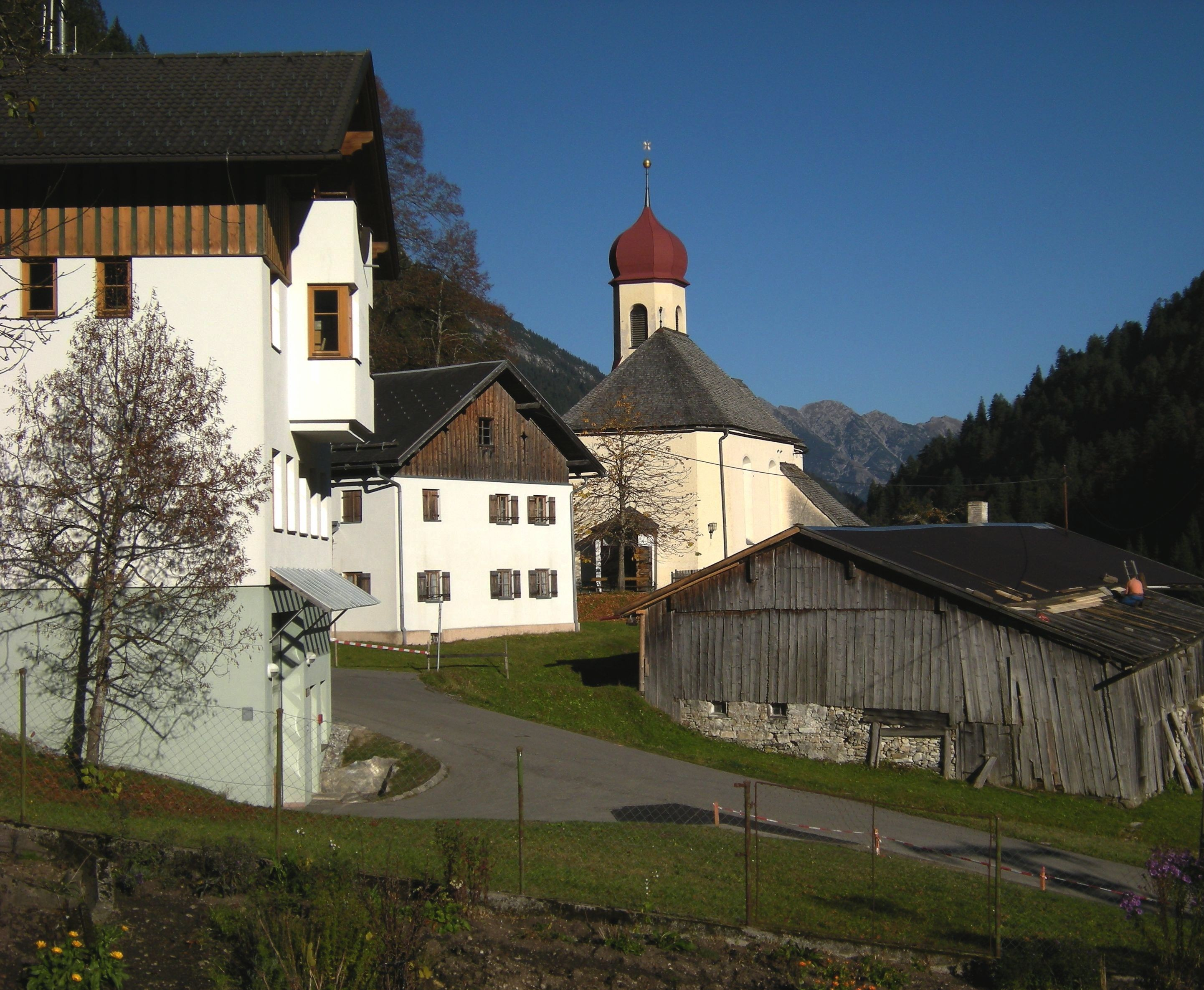 Hinterhornbach - Bauernhäuser mit Kirche